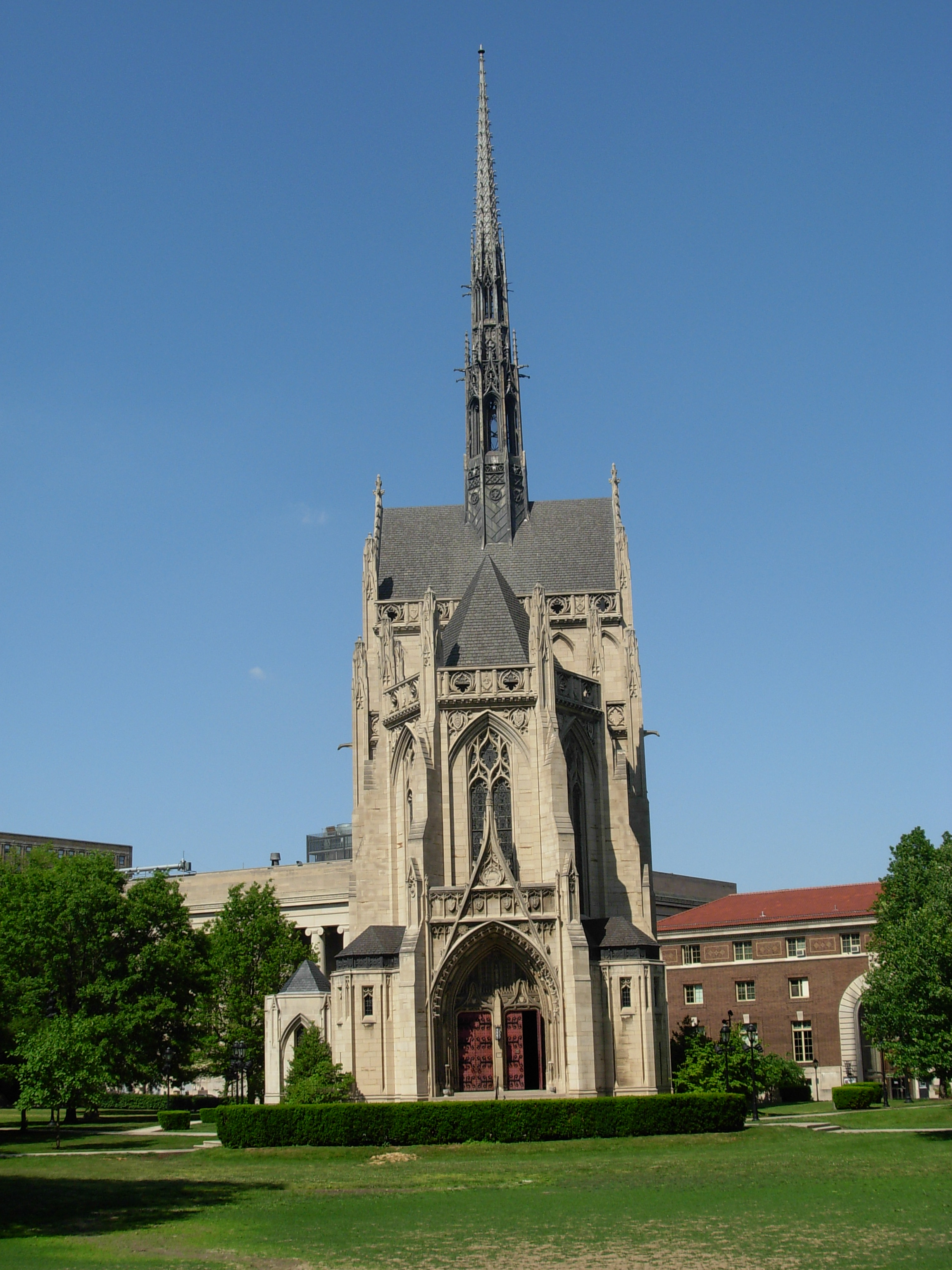 Heinz Memorial Chapel, Pittsburgh.